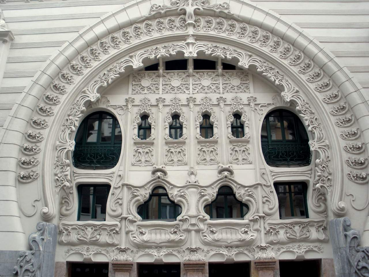 Bilbao - Teatro Campos Eliseos